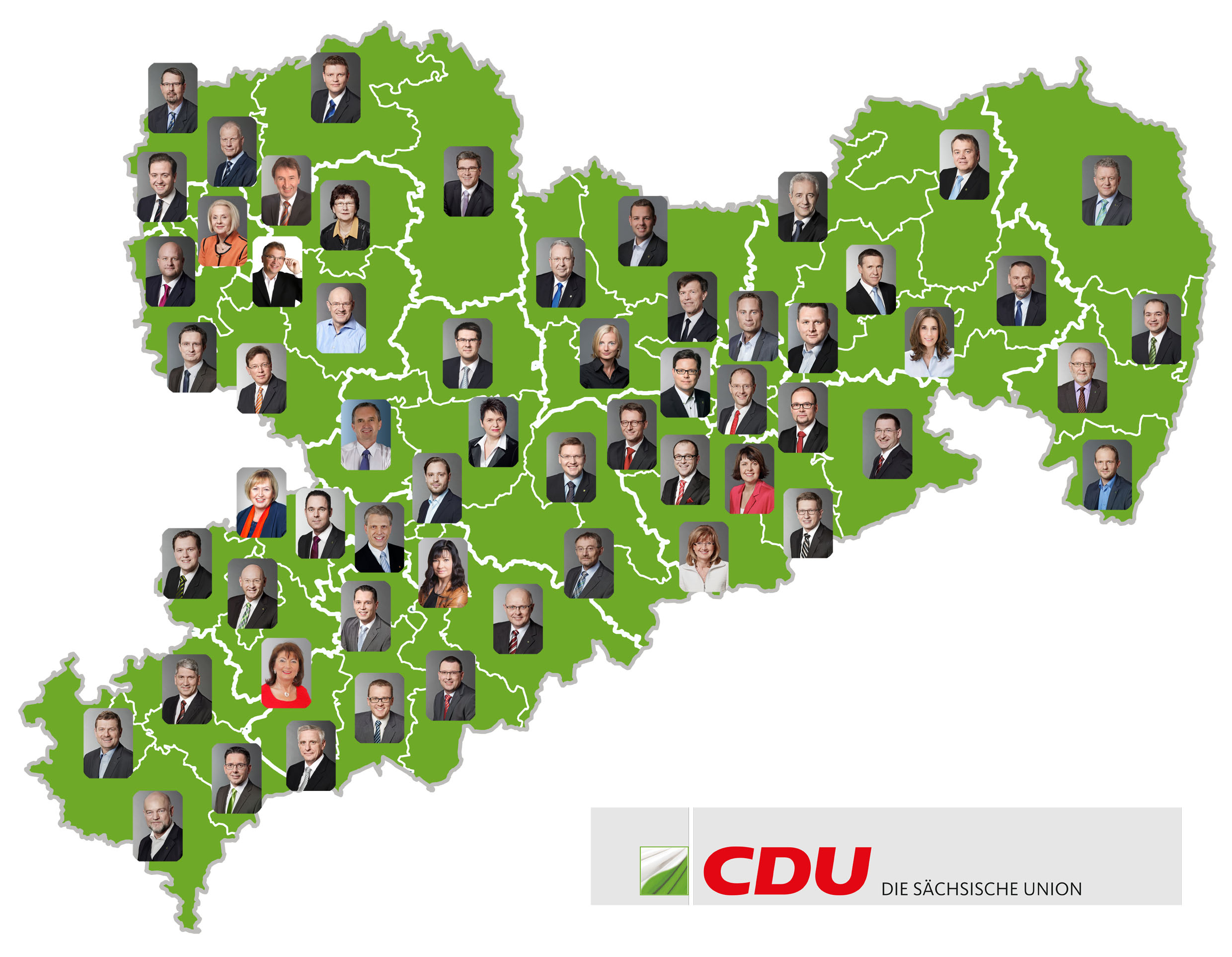 Karte mit den CDU-Abgeordneten und ihren jeweiligen Wahlkreisen nach der Landtagswahl in Sachsen 2014. Standː Oktober 2014